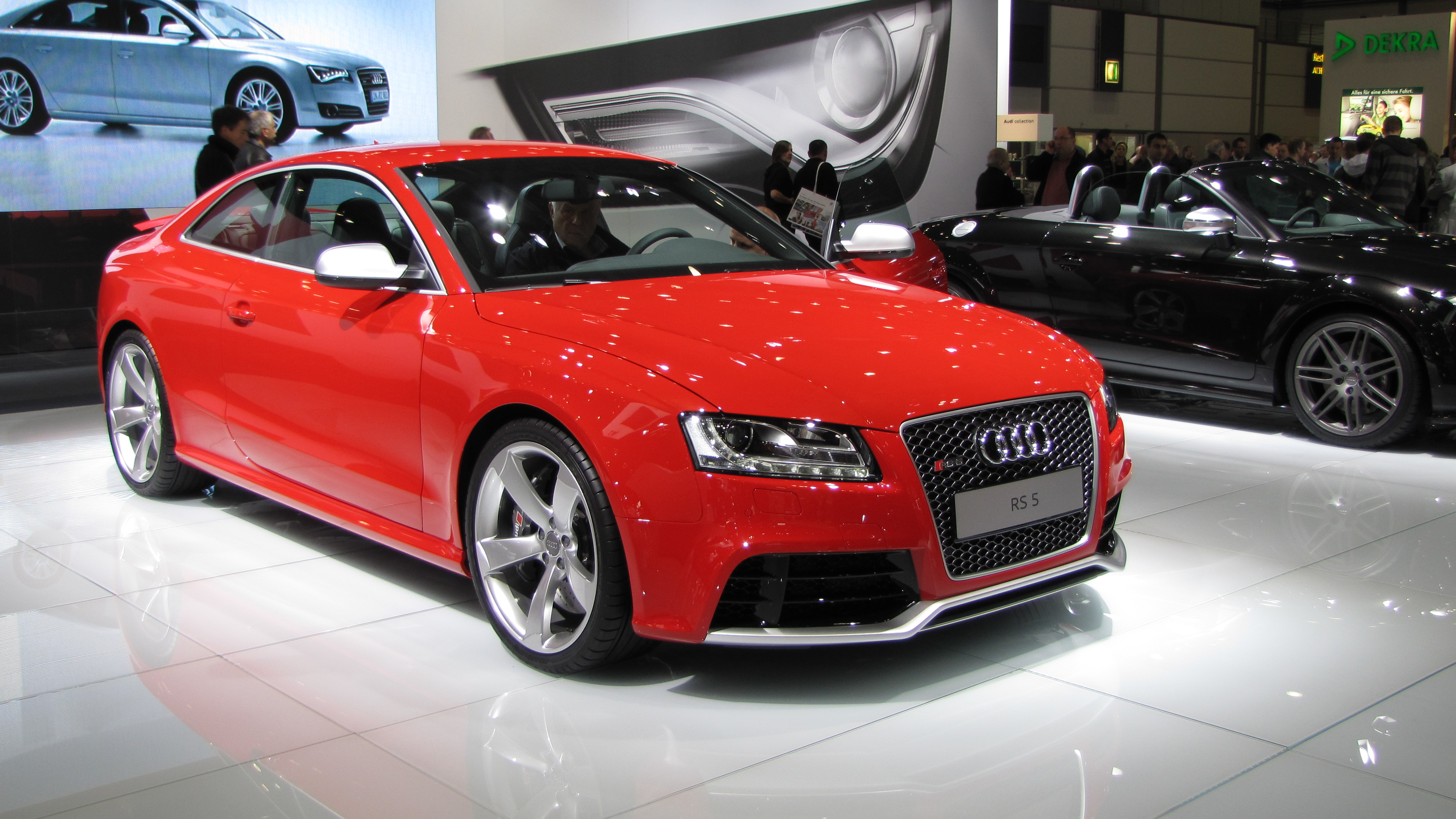 Audi RS5 auf der AMI Leipzig